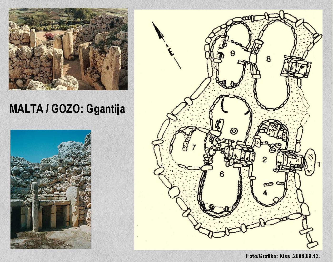 Ggantia: Megalit templom fotók és alaprajz (Málta)